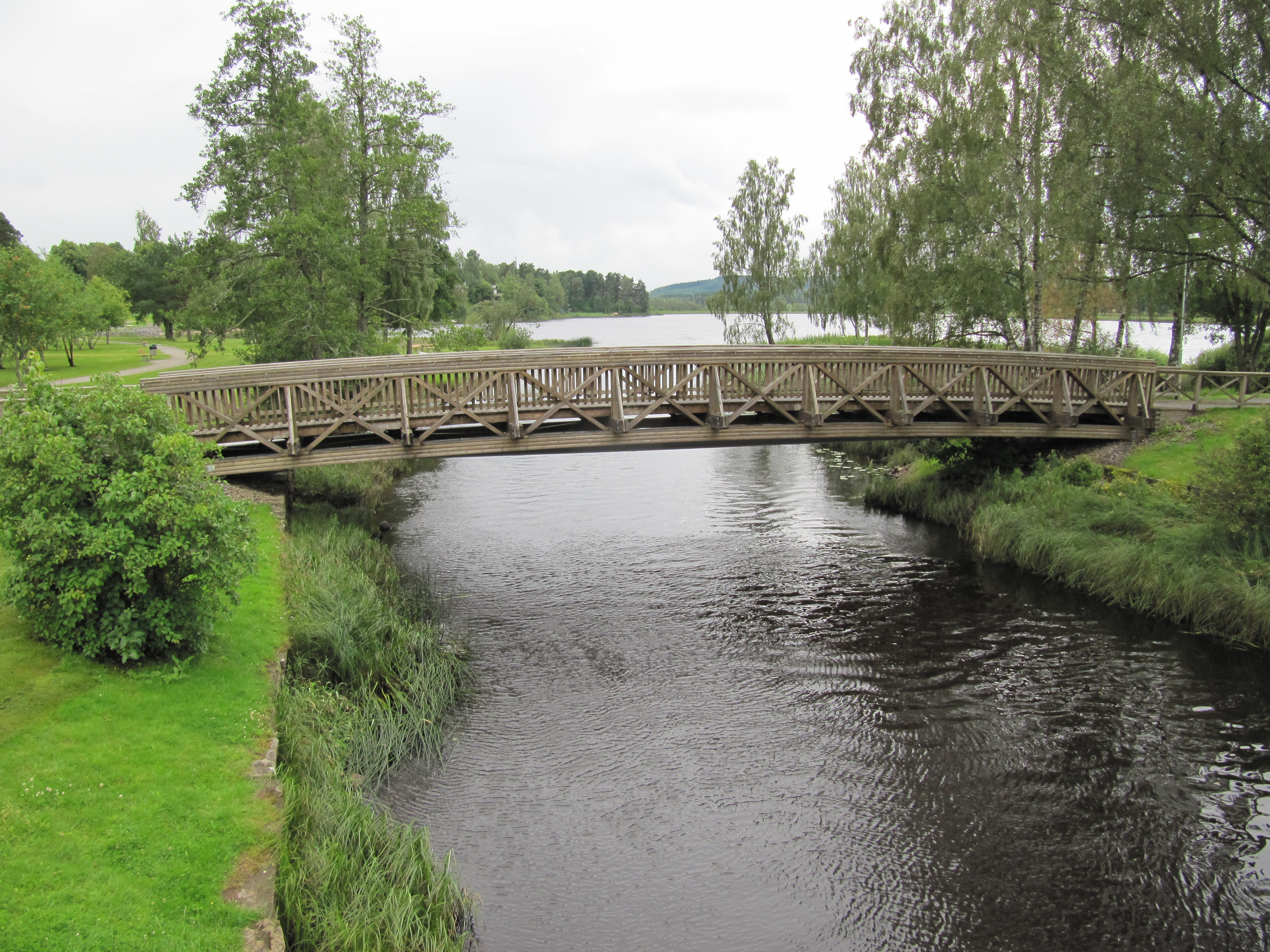 Tranemosjön bakom bron